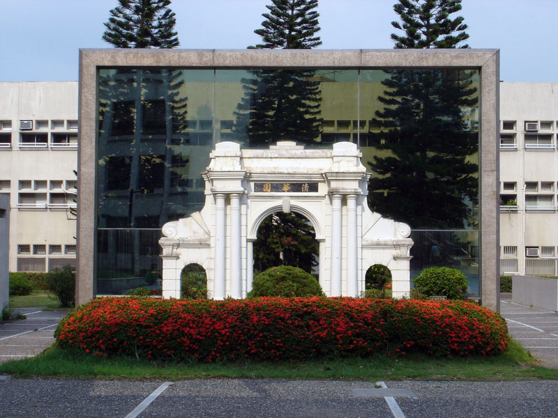 國立清華大學北京清大二校門縮小模型